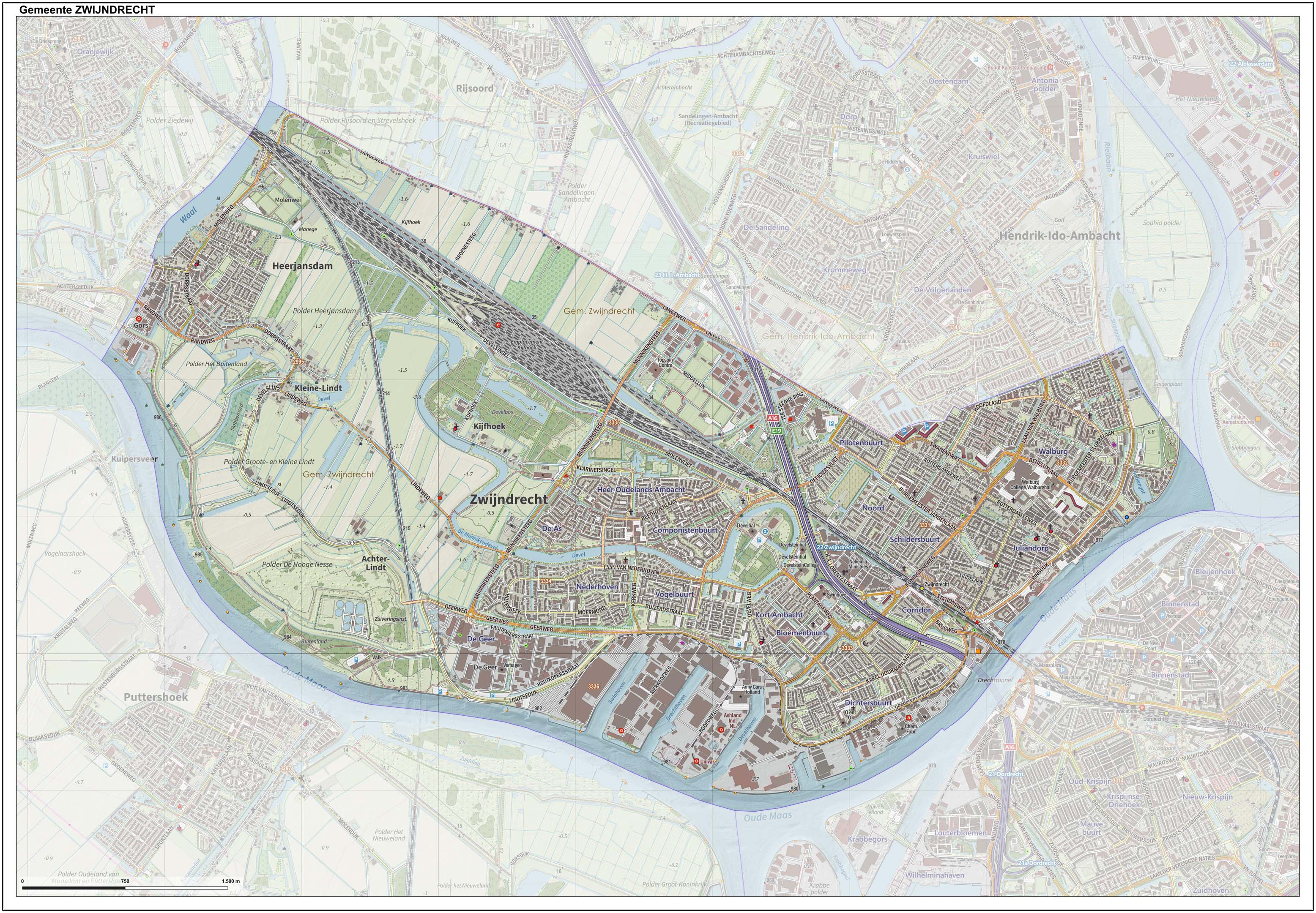 Topografische gemeentekaart. Resolutie: 400 pixels/km. Kaartbeeld samengesteld uit de open geodata van de Top10NL en Top25namen (Kadaster), Creative Commons-BY licentie. Gebouwvlakken uit open geodata BAG extract. Wegen uit de OpenStreetMap, OpenStreetMap community. Reliëfschaduw uit de Actuele Hoogtekaart AHN2. Samenstelling en kleurenschema: Jan-Willem van Aalst, met QGIS. Zie ook de Legenda.